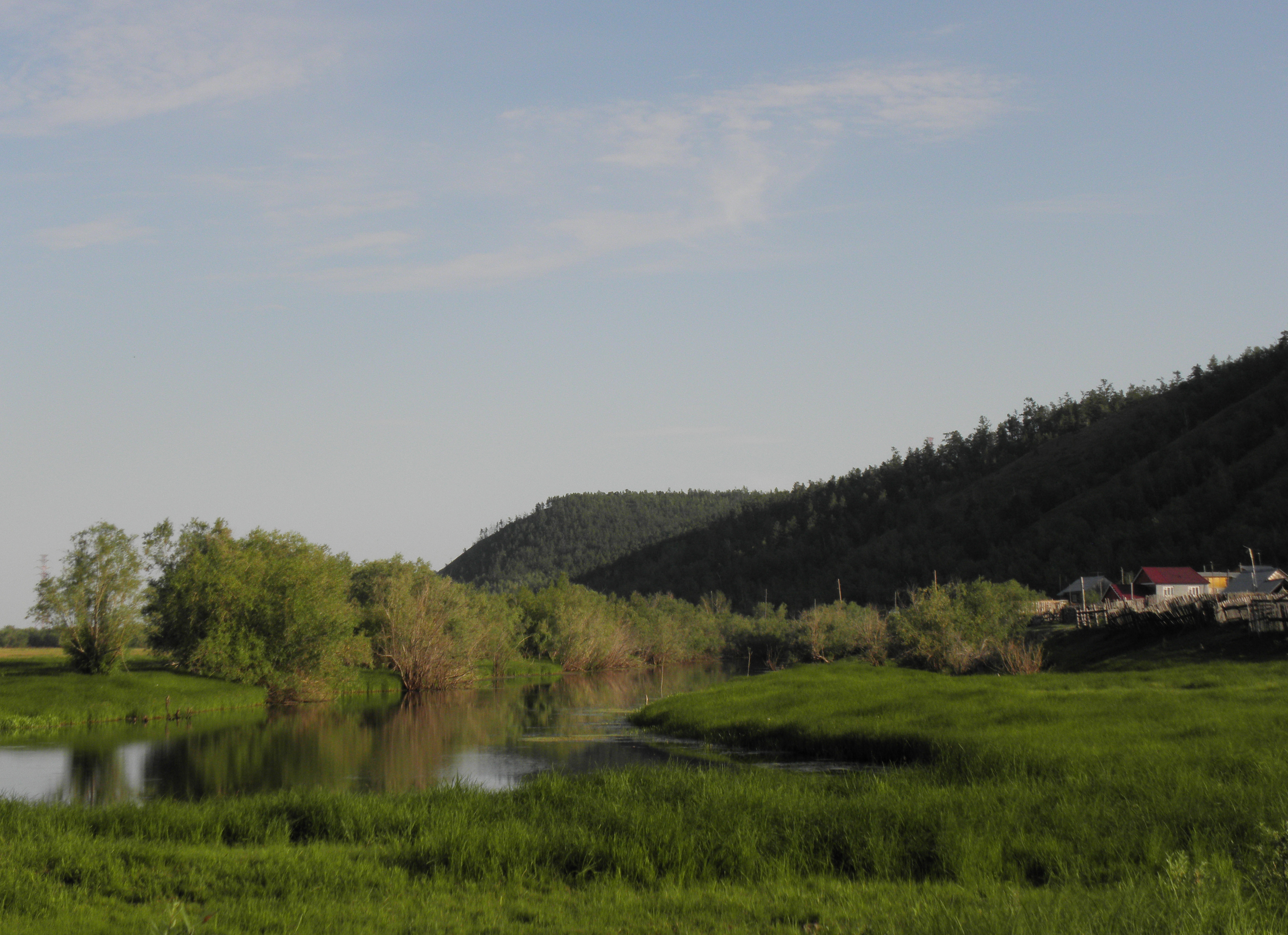 Озеро (старое русло протоки) рядом с ул. Набережной в Старой Табаге